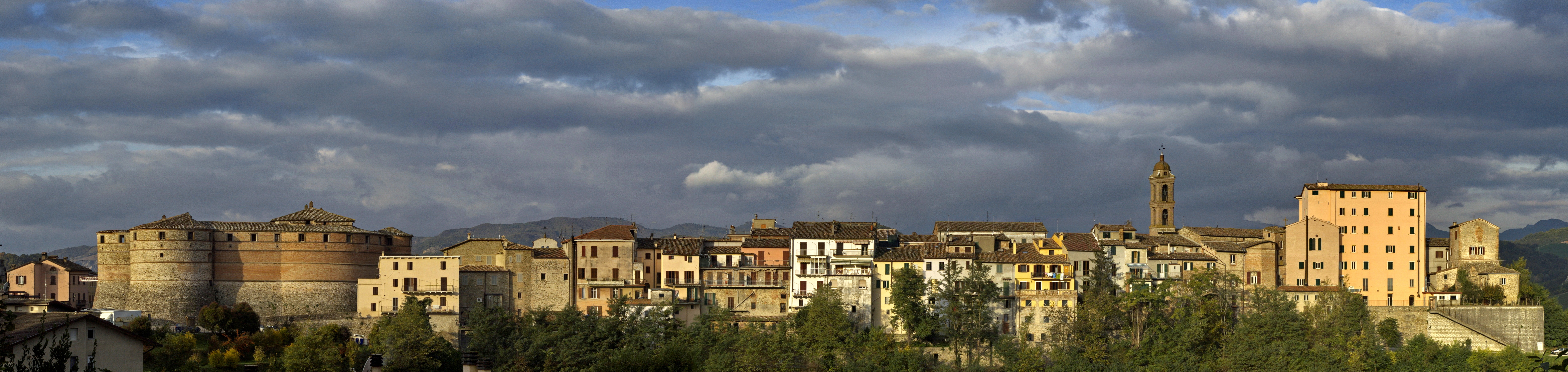 Panorama con la Rocca.